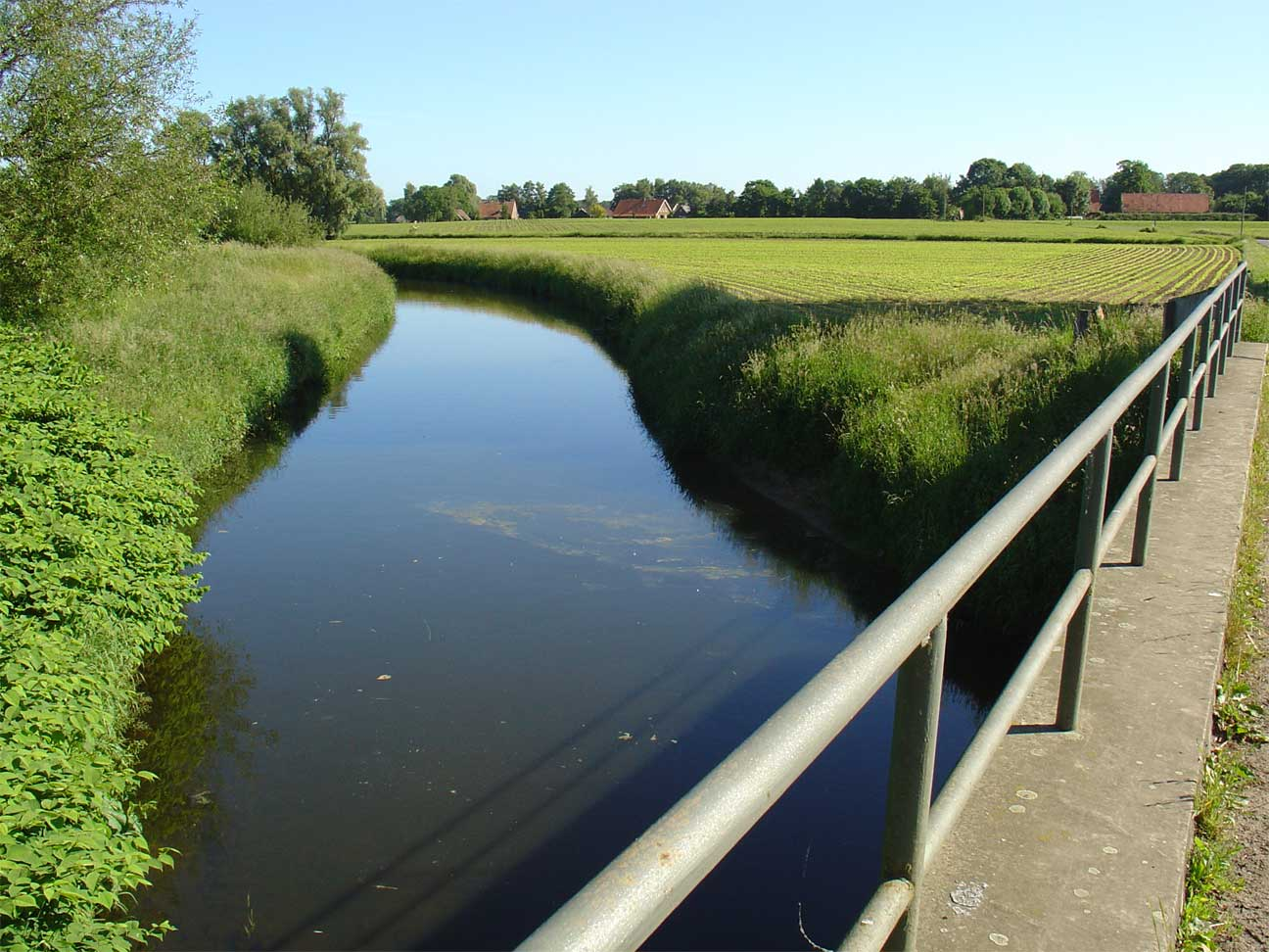 De Berkel iets ten zuiden van Oldenkott(e) in Duitsland net over de grens met Nederland